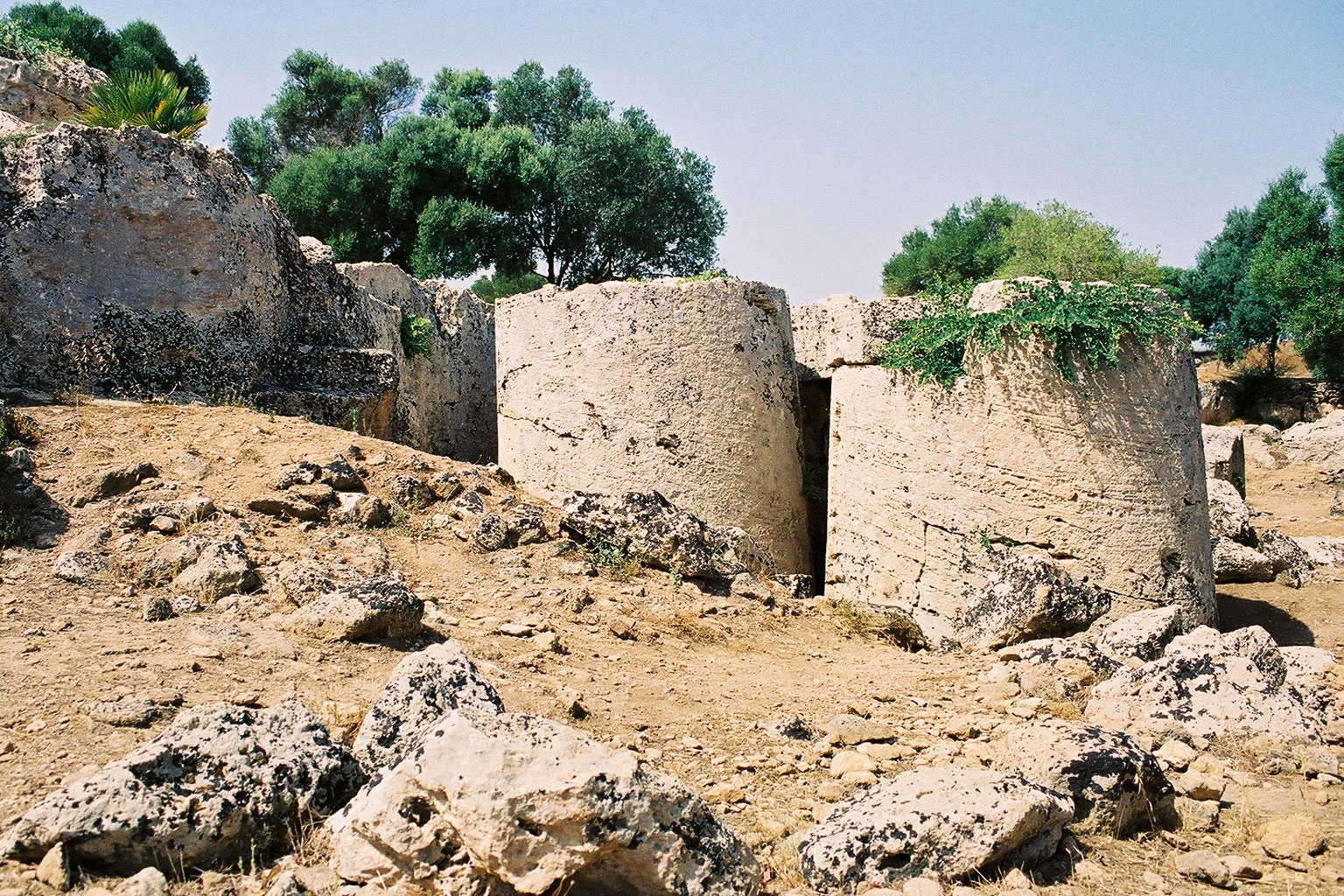 Rocche di Cusa, Campobello di Mazara Quarry for Selinunte, raw columns for unfinished temple G